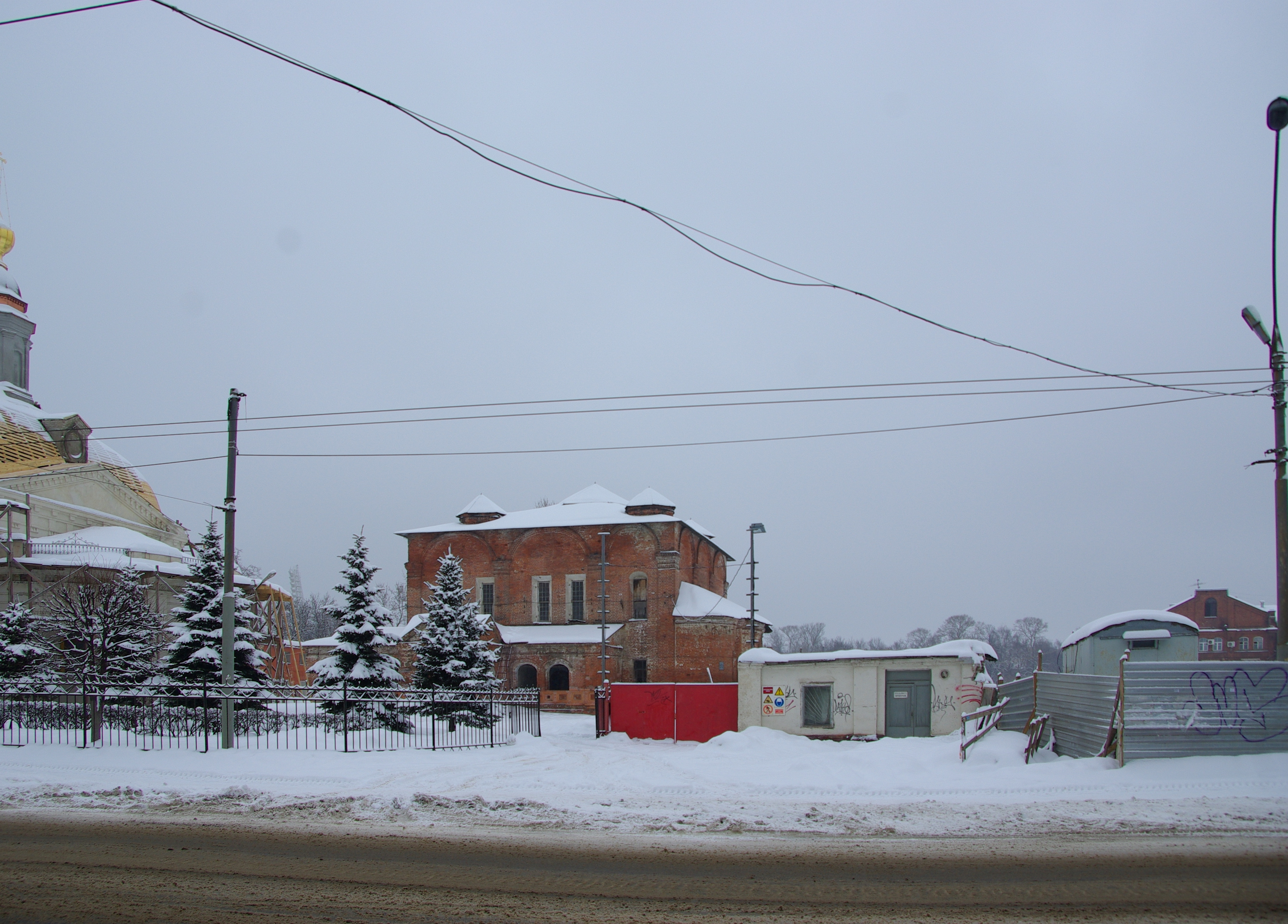 Храмовый комплекс: улица Свободы, 44, 44-а, Ярославль, Ярославская область